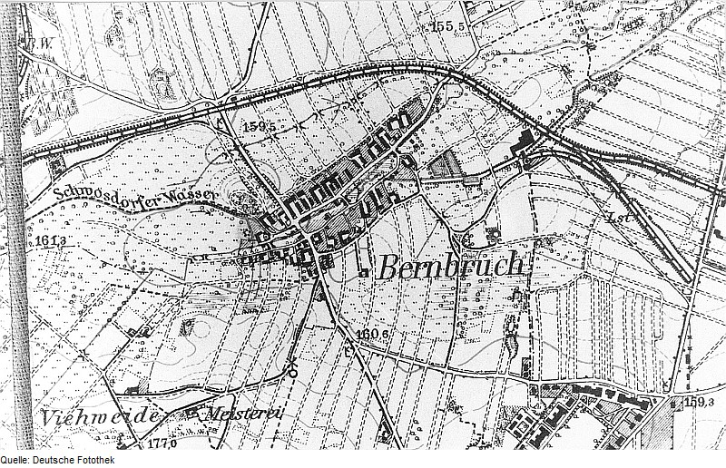 Original image description from the Deutsche Fotothek Kamenz-Bernbruch. Meßtischblatt, Sekt. Kamenz, 1904